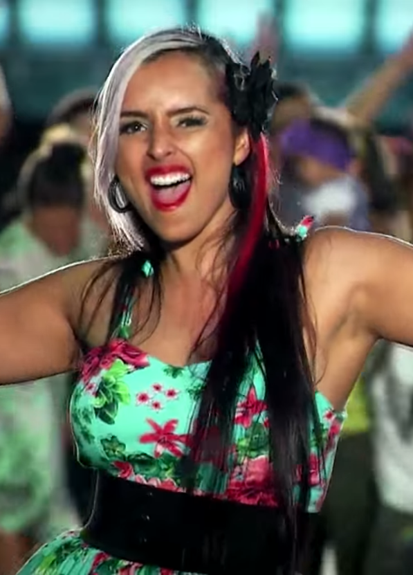 Miranda (cantante colombiana) en 2015